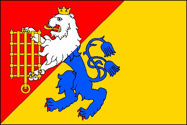 Vlajka obce Čistá (okres Mladá Boleslav)